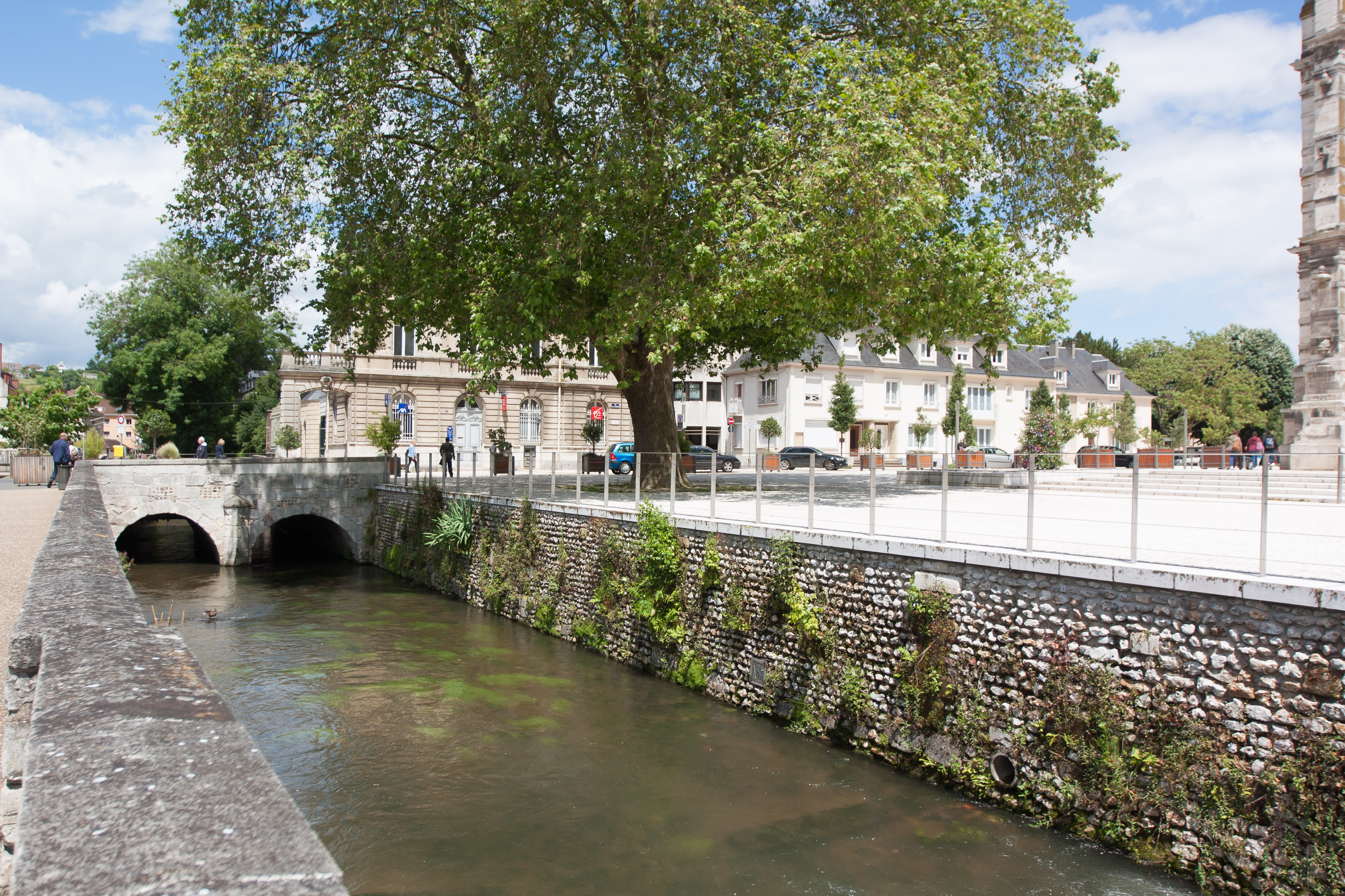 La rivière Iton dans Évreux // Évreux - Eure - France